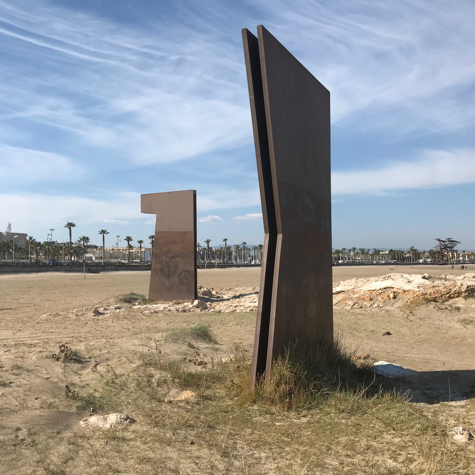 Escultura urbana d'acer amb quatre elements diseminats que assenyalen els punts cardinals. Homenatge a Carles Barral. Promotors: Port de Tarragona i Ajuntament de Vila-seca.